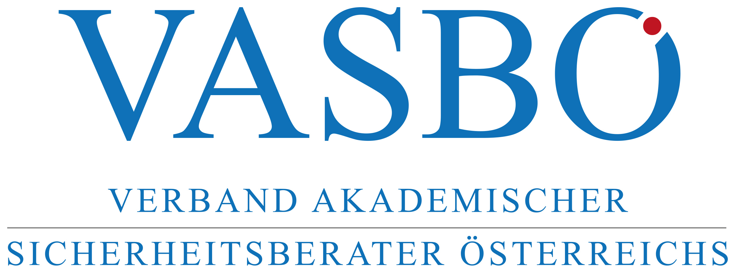 Das Logo des Verbands der akademischen Sicherheitsberater Österreich